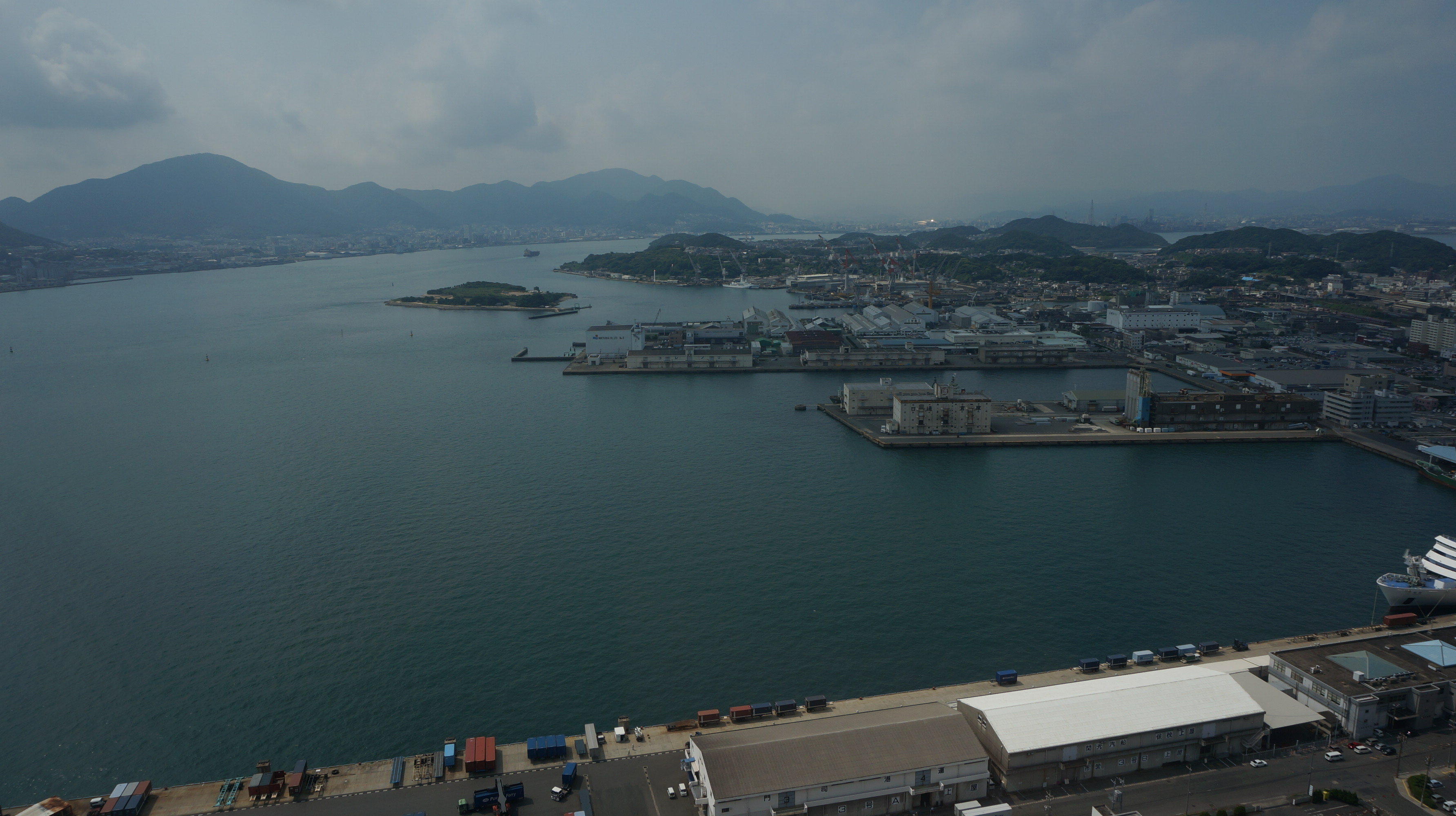 下関海峡ゆめタワーから彦島・小倉方面の眺め。手前は下関港本港地区、その奥に三菱重工下関造船所、造船所左は船島(巌流島)。関門海峡を挟んだ右奥の銀色の建物は小倉にある北九州メディアドーム。(2013年8月撮影)